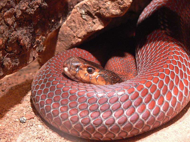 Red Spitting Cobra (Naja pallida) from Africaзмеи зоопарка